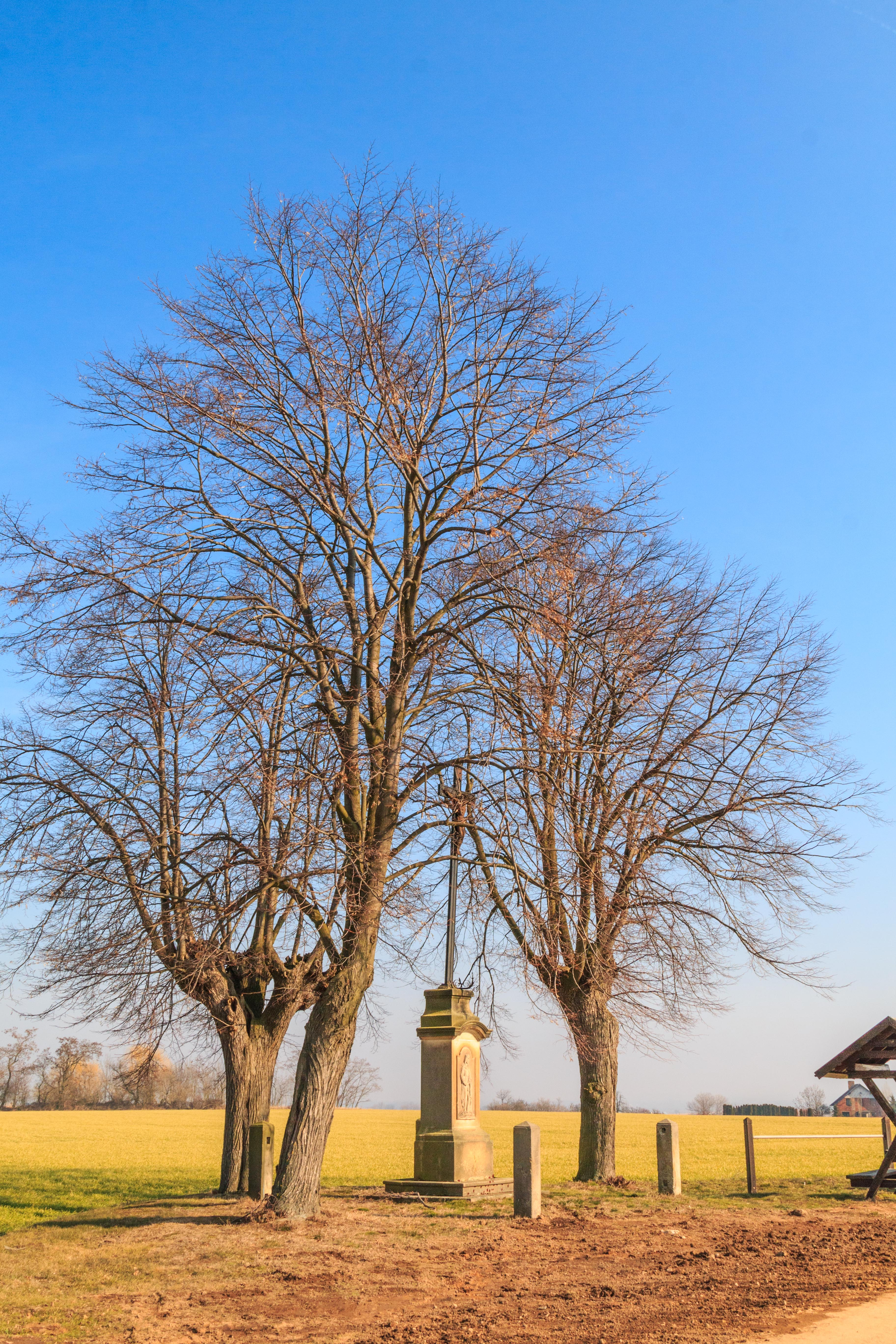 Kříž u vesnice Polizy